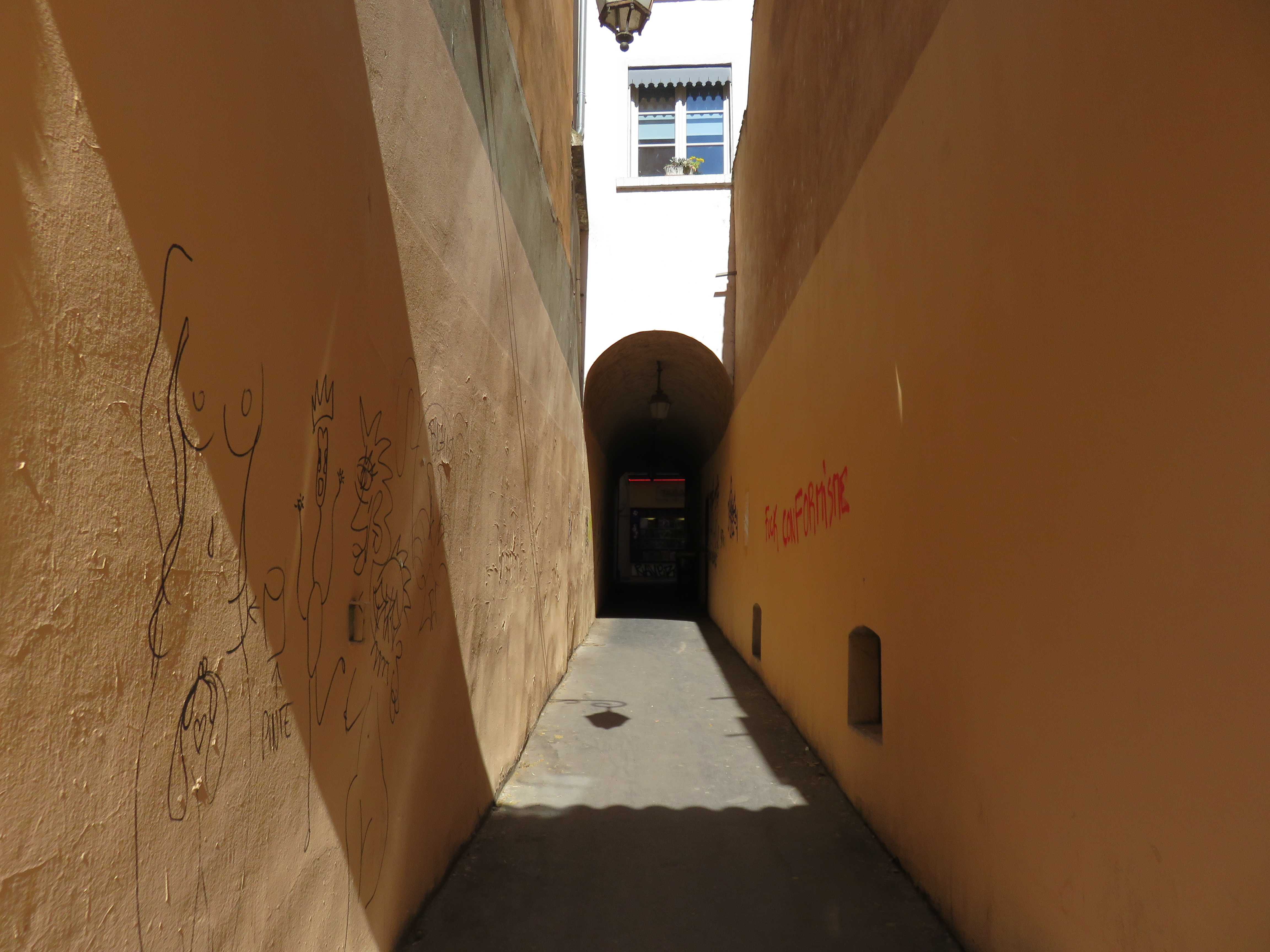 Vue du passage de l'Abbaye de la Déserte (vers le nord), dans le 1er arrondissement de Lyon.